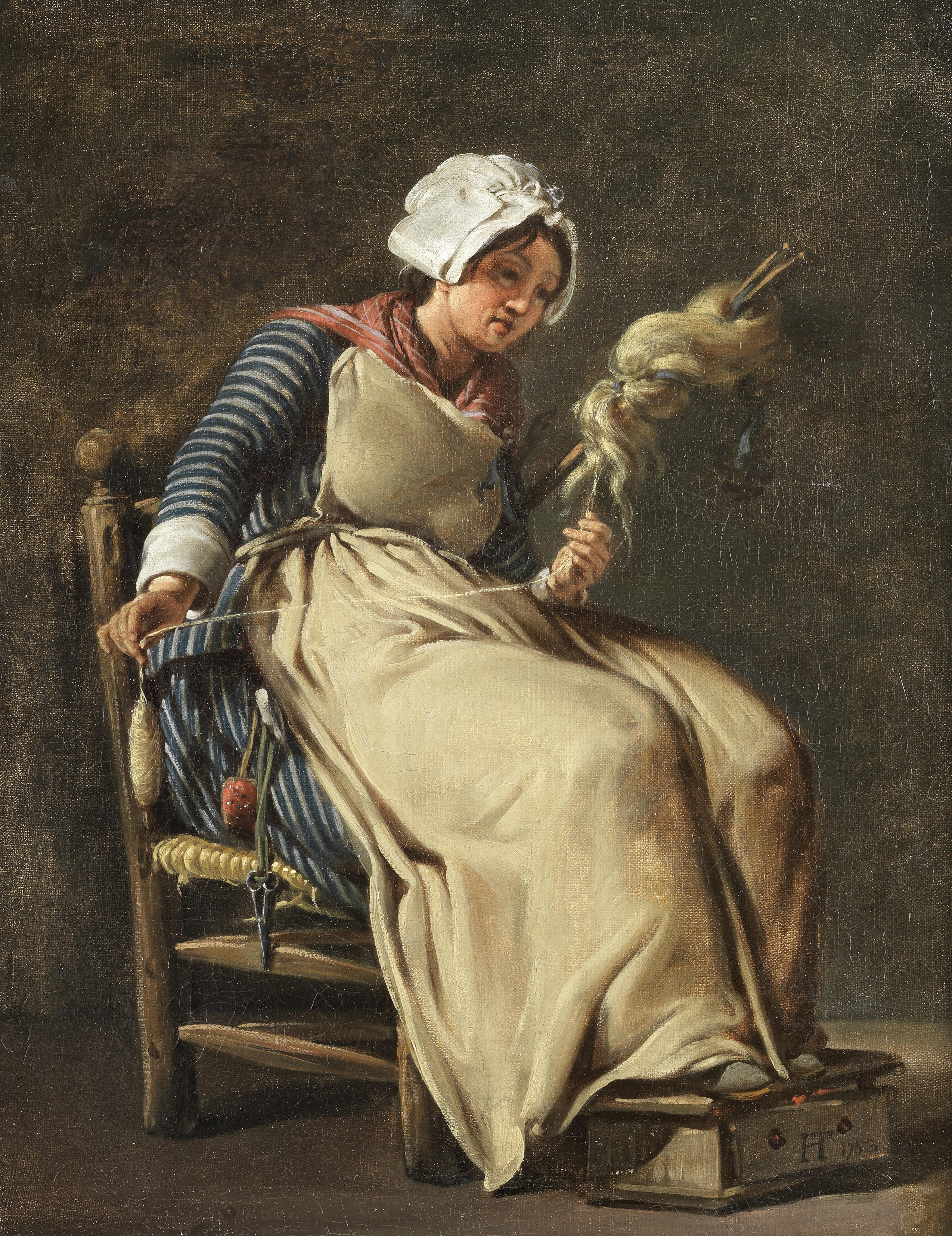 A kitchen maid